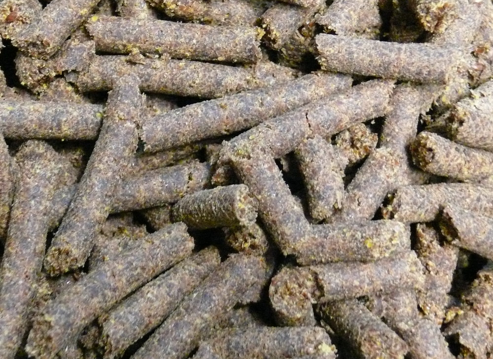 Leinpresskuchen nach der Ölpressung durch Schneckenpresse, hochwertiges Futtermittel